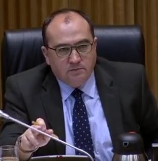 Le député socialiste Pedro José Muñoz González.